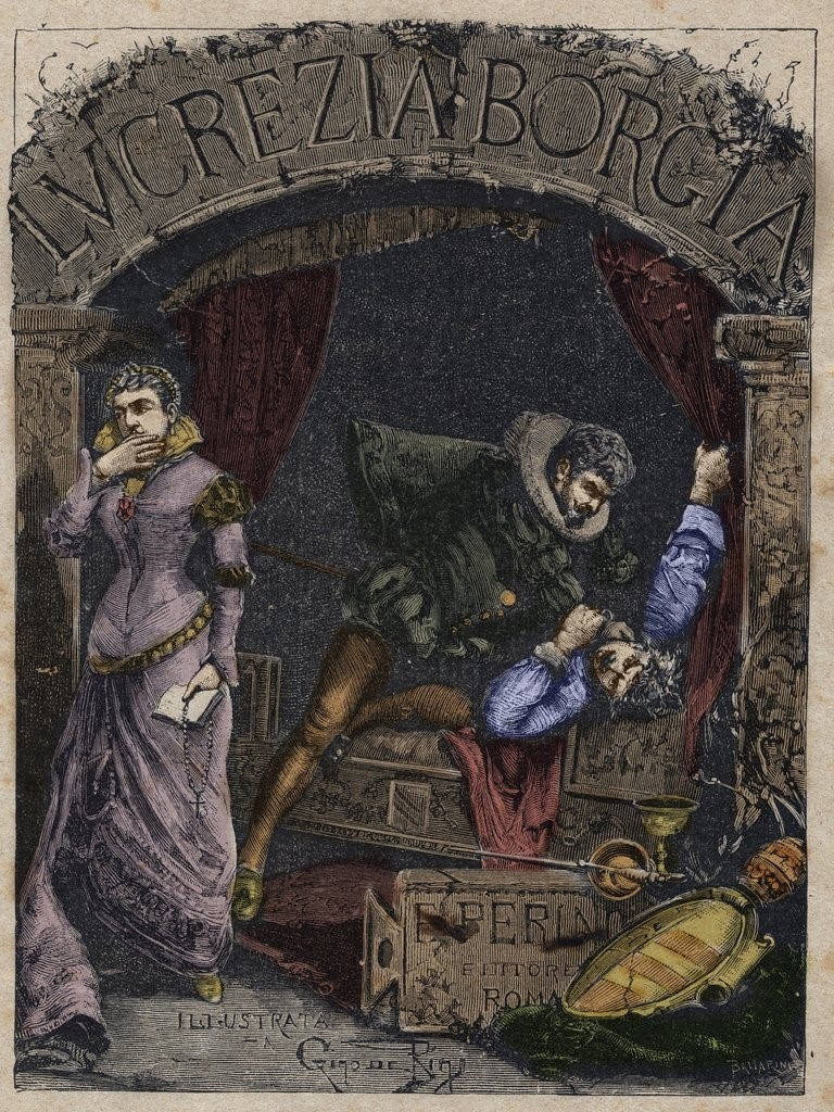 Michelotto Corella (1470-1508), sicario di Cesare Borgia, uccide nel 1500 Alfonso d'Aragona, marito di Lucrezia Borgia (stampa)